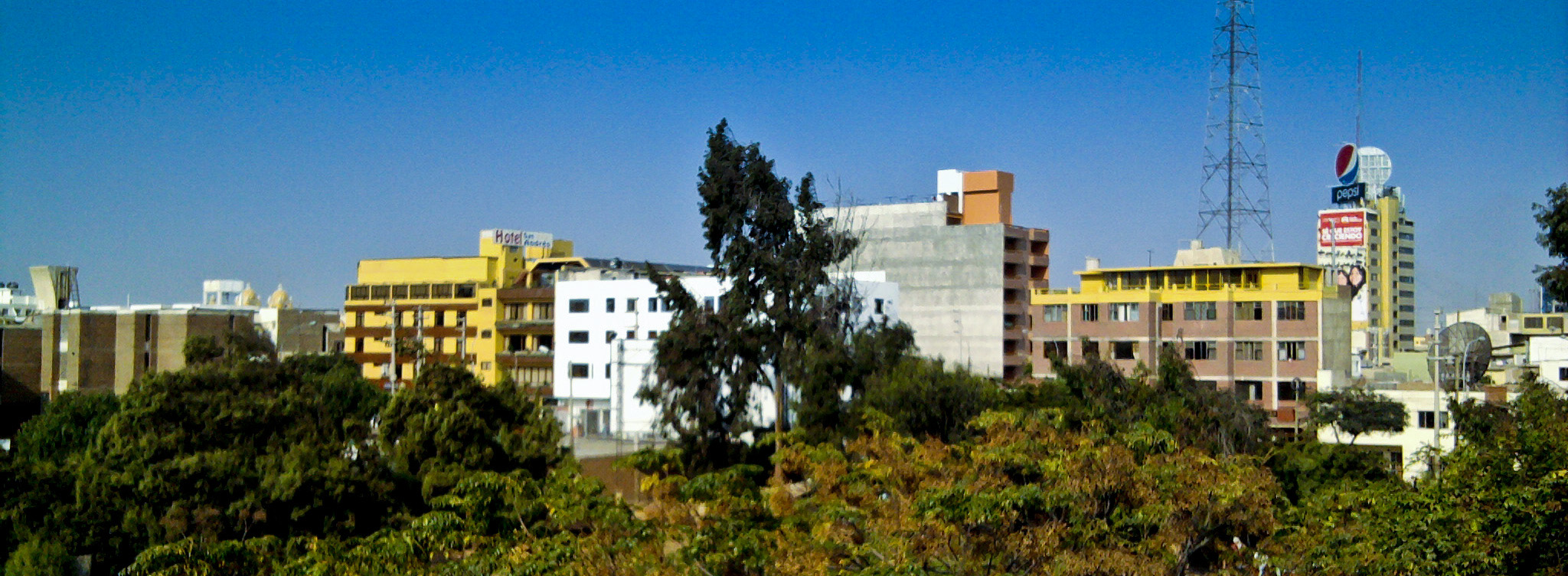 Ciudad de Trujillo Perú